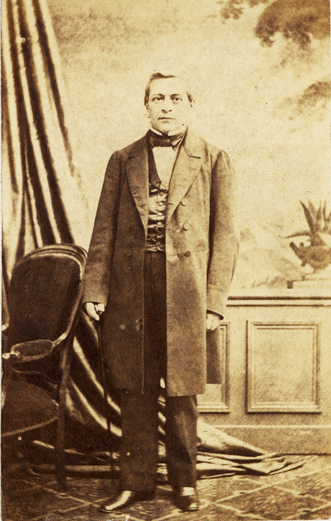 Manuel Francisco Antonio Julián Montt Torres (Petorca, 4 de septiembre de 1809 — Santiago, 21 de septiembre de 1880)[1] fue el Presidente de Chile entre 1851 y 1856, siendo reelegido inmediatamente por un segundo periodo entre 1856 y 1861. Perteneció a la emblemática familia Montt.